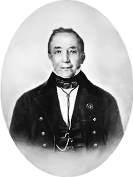 Бунин, Иван Петрович (1773-1859), капитан 2-го ранга, дядя Эразма Ивановича Стогова.